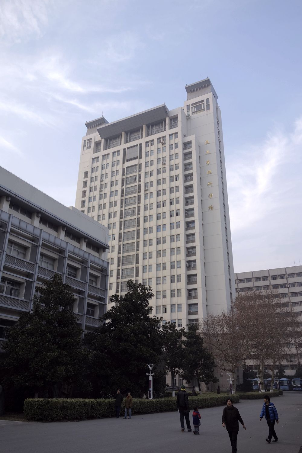 南京大学 鼓楼校区 逸夫管理科学楼